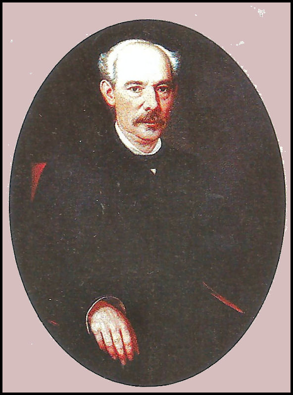 Óleo sobre tela del pintor argentino Ignacio Baz (1826-1887) expuesto en la Casa Histórica de la Independencia en San Miguel de Tucumán